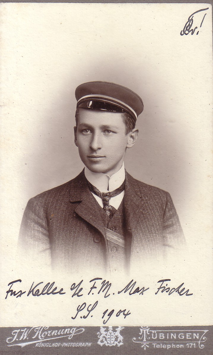 Albert Kallee als Student in Tübingen: Fux Kallee seinem lieben Fux-Major Max Fischer, Sommersemester 1904